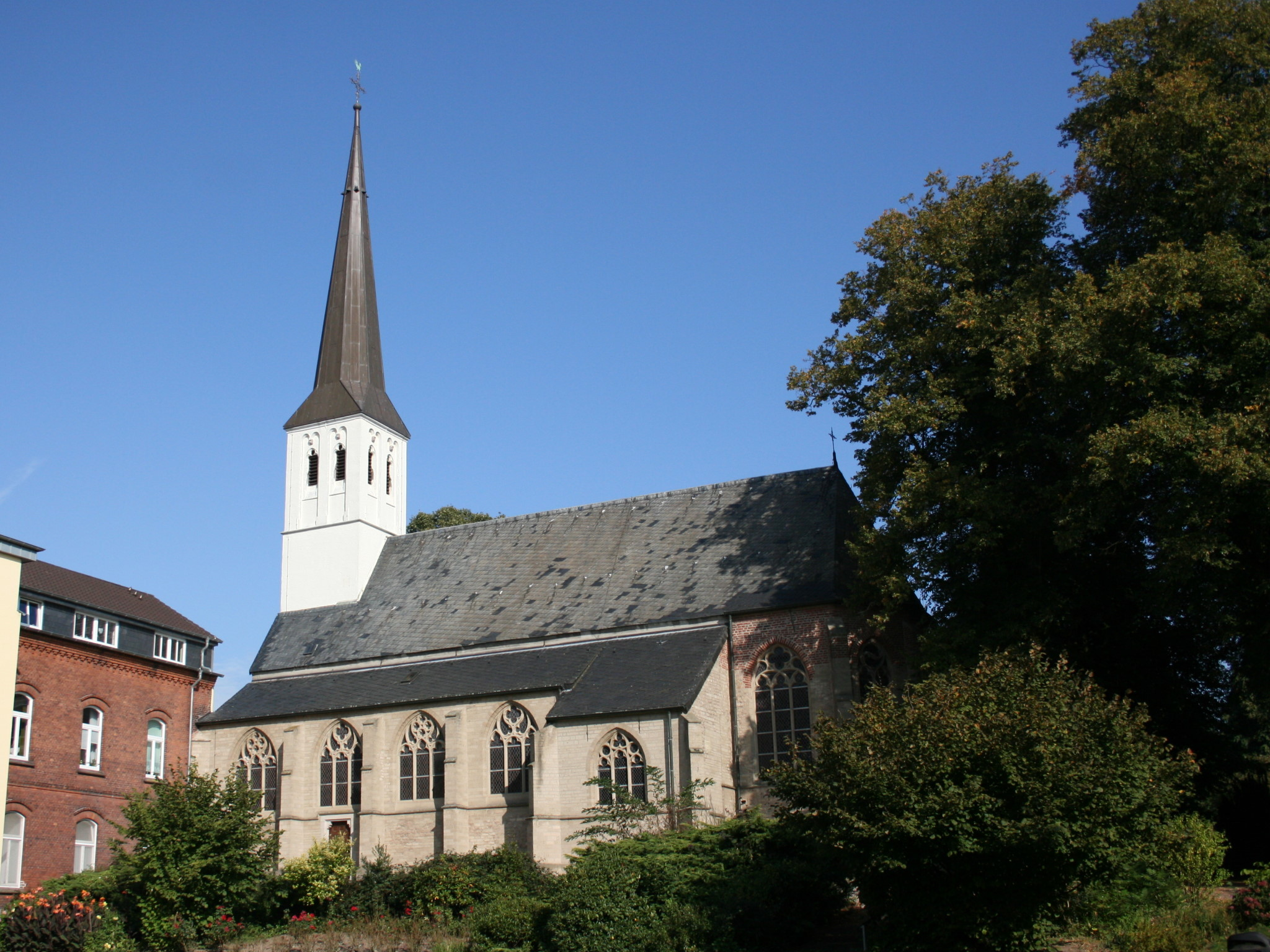 Sankt Gerebernus-Kapelle in Sonsbeck